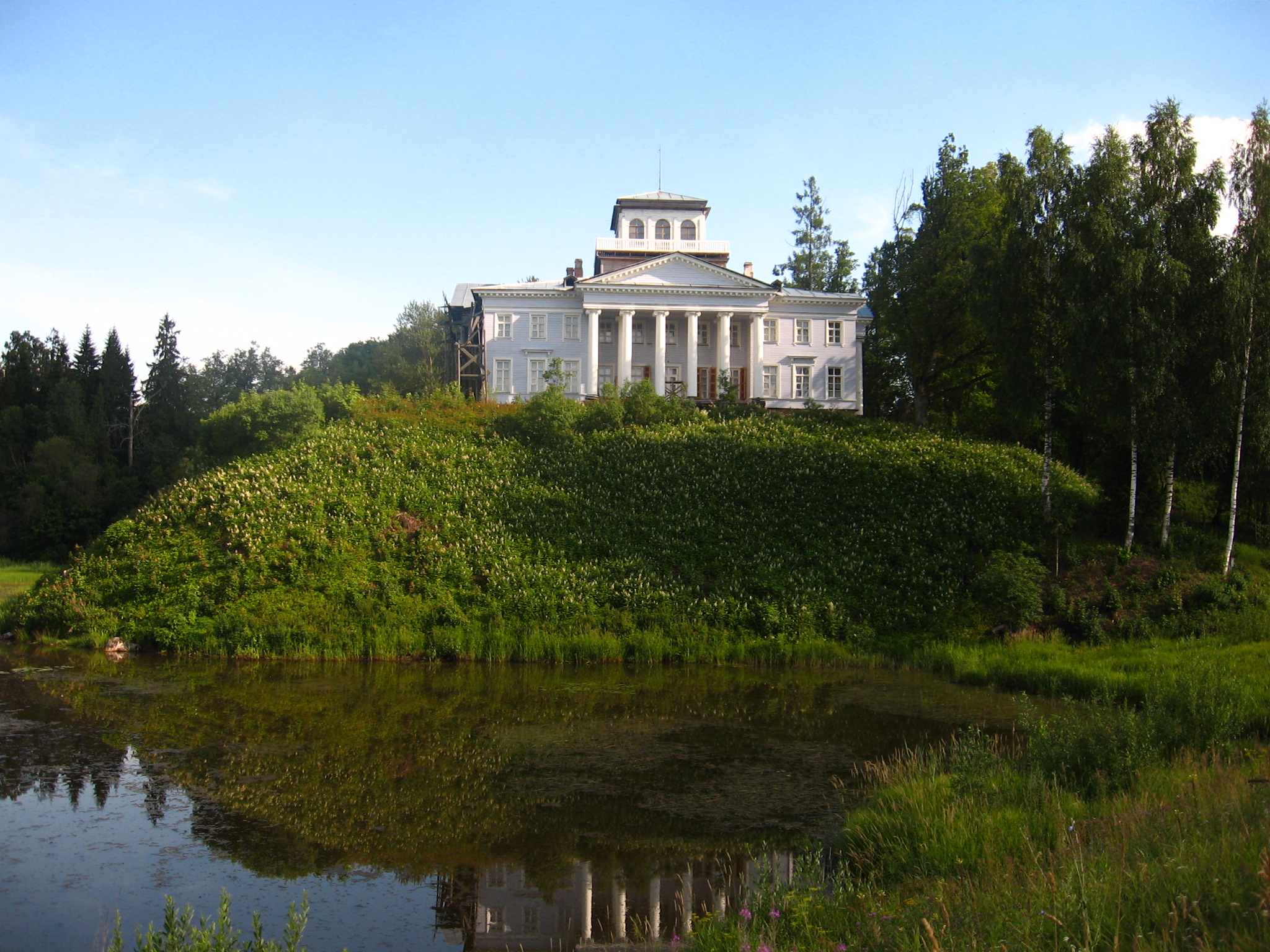 "House of Vladimir Nabokov in Rozhdestveno